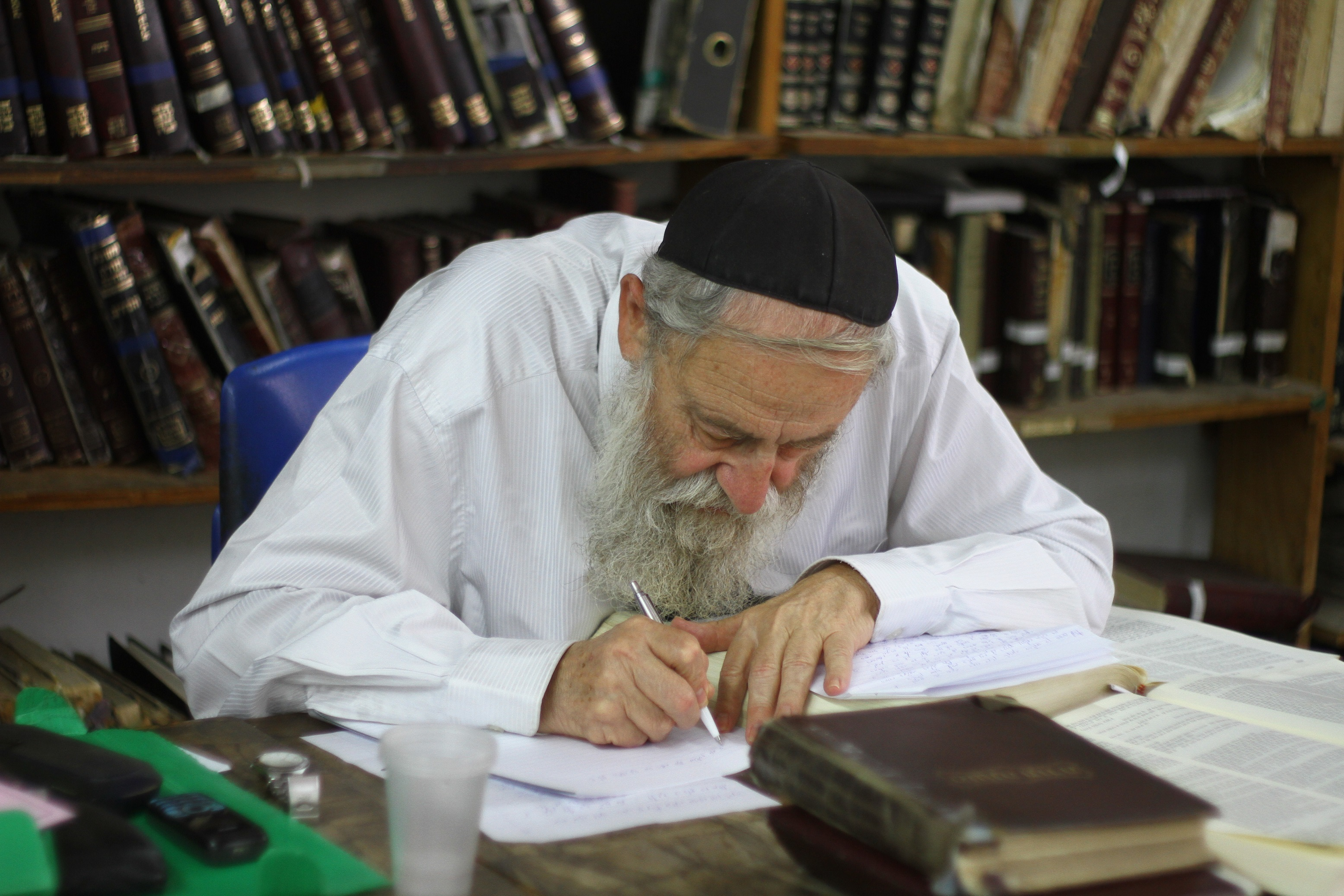 הרב שטרן במכון הלכה ברורה